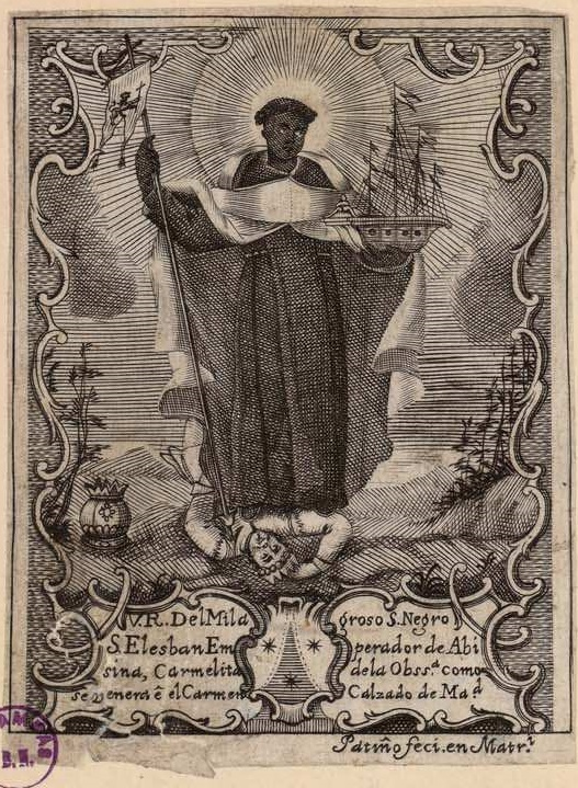 San Elesban, aguafuerte y buril. Inscripción: "V. R. Del Mila / groso S. Negro / S. Elesban Em / perador de Abi / sina, Carmelita / de la Obss.ª como / se venera ê el Carmen / Calzado de Ma.d"